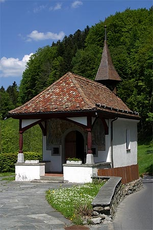 Schlachtkapelle Morgarten(Nr. 03.1-4523)